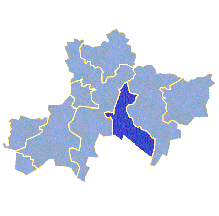 Powiat żagański - Gmina Małomice